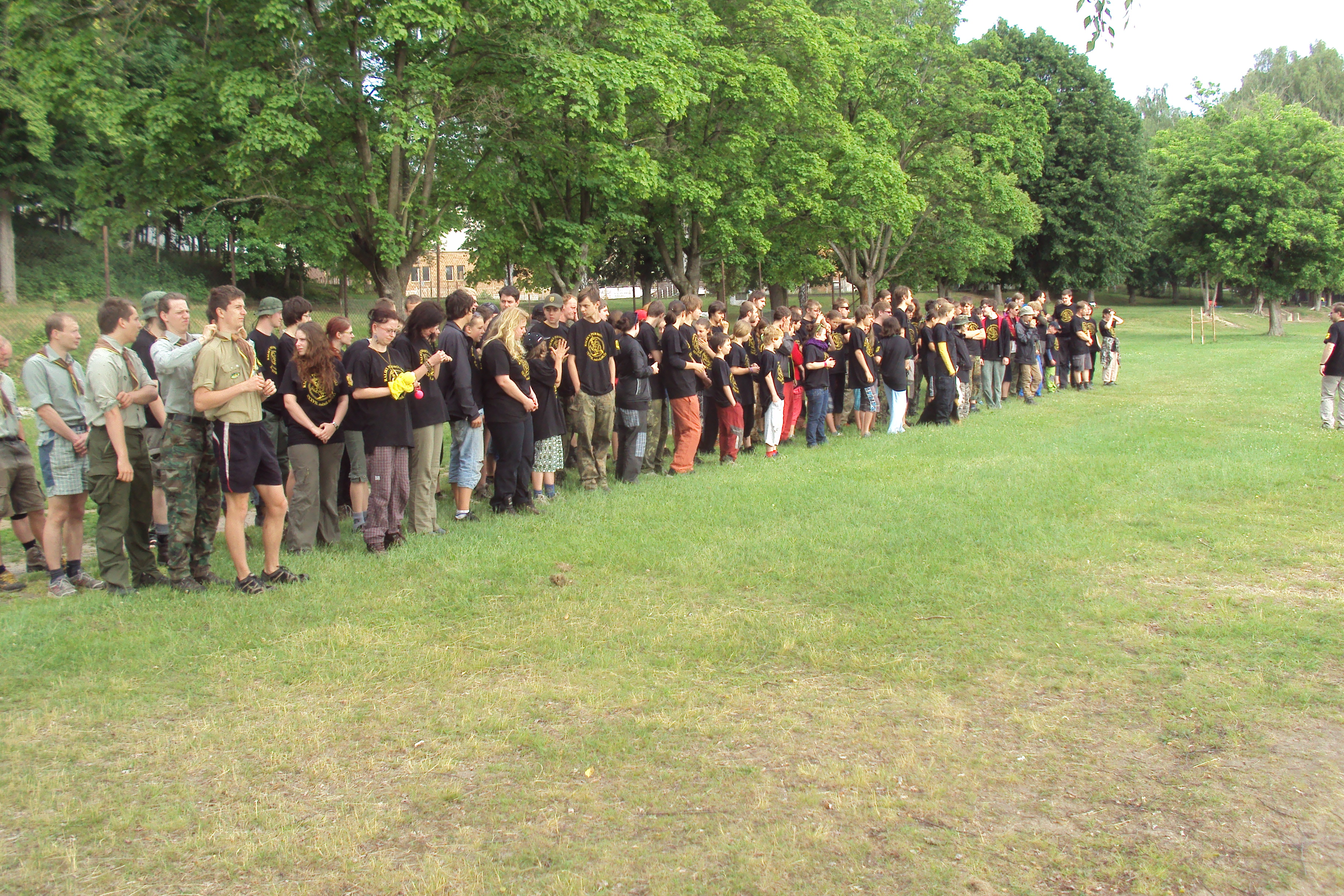 Nastoupené oddíly na pláži v Stráži pod Ralskem, vyhlašování výsledků BHCO - Branná hra Cesta odhodlání 2012, 36. ročník